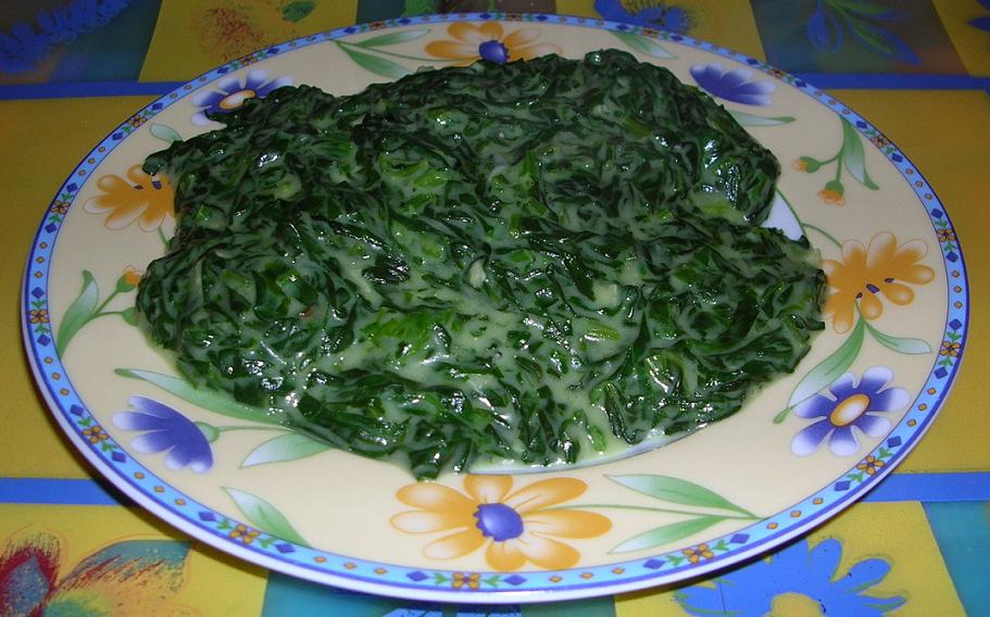 Szpinak gotowy do spożycia. Niektórzy to lubia, ja osobiście za tym nie przepadam :)